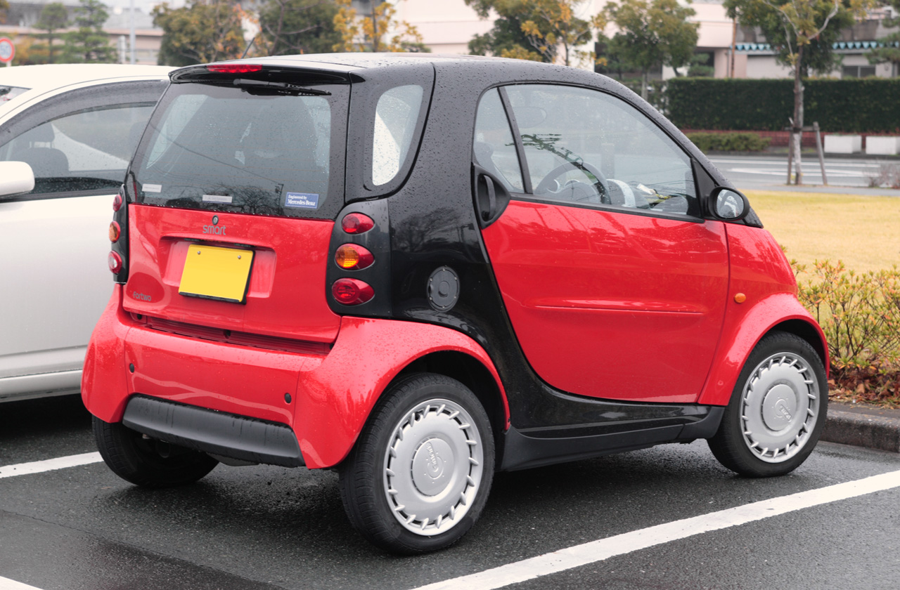 Smart K for Japanese market